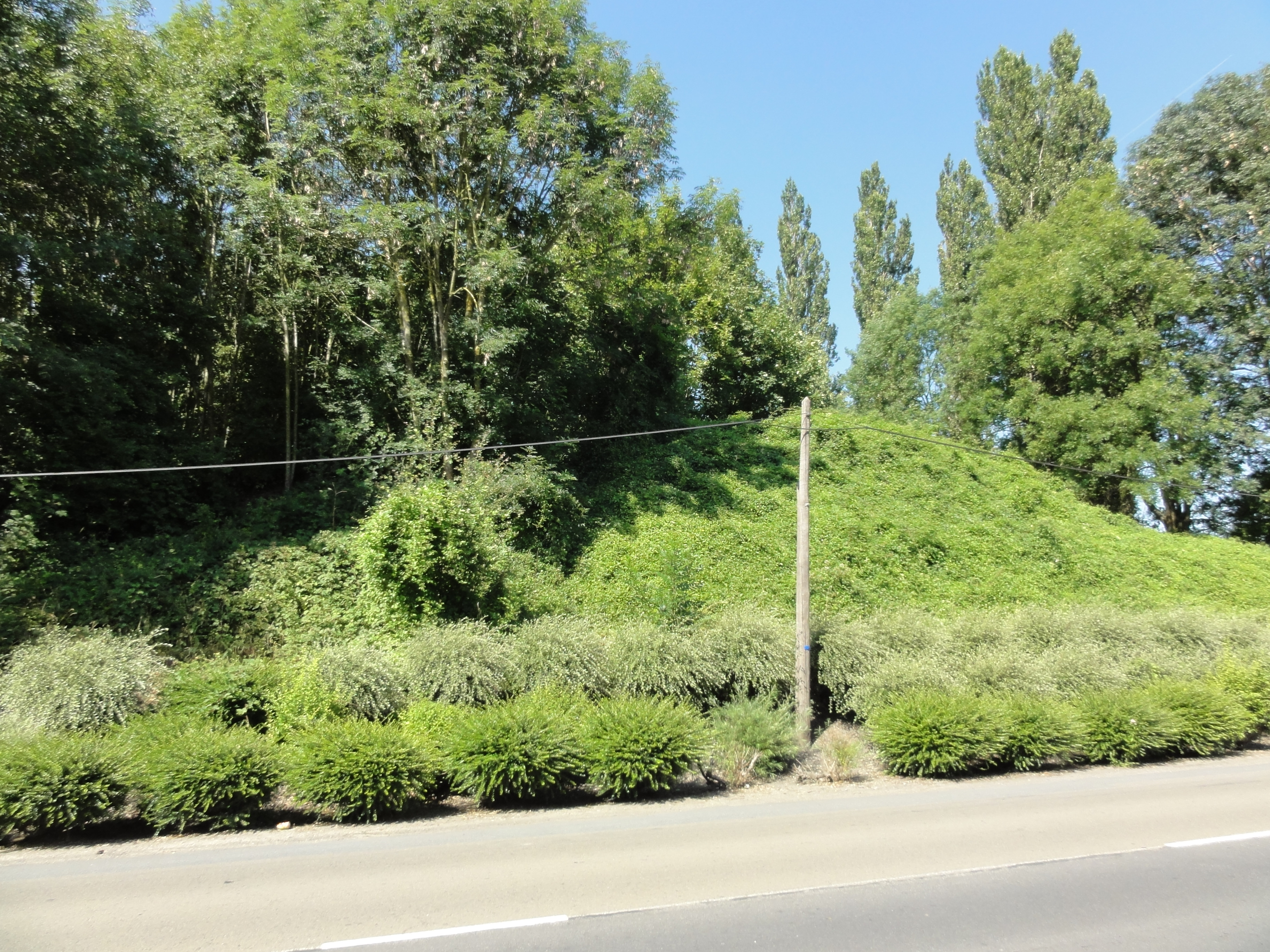 Terril n° 166A dit Blignières Carreau, Fosse Blignières de la Compagnie des mines d'Anzin, Wavrechain-sous-Denain, Nord, Nord-Pas-de-Calais, France.